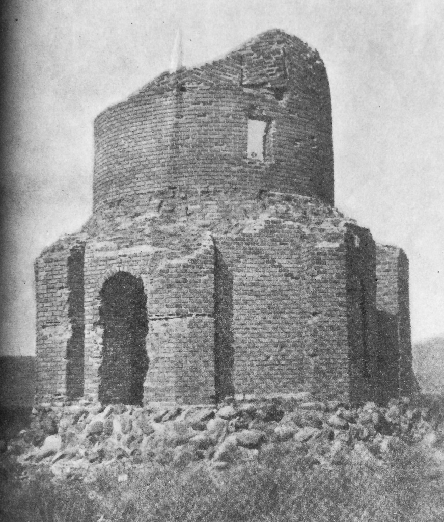 Dər türbəsi 1970-ci illərdə